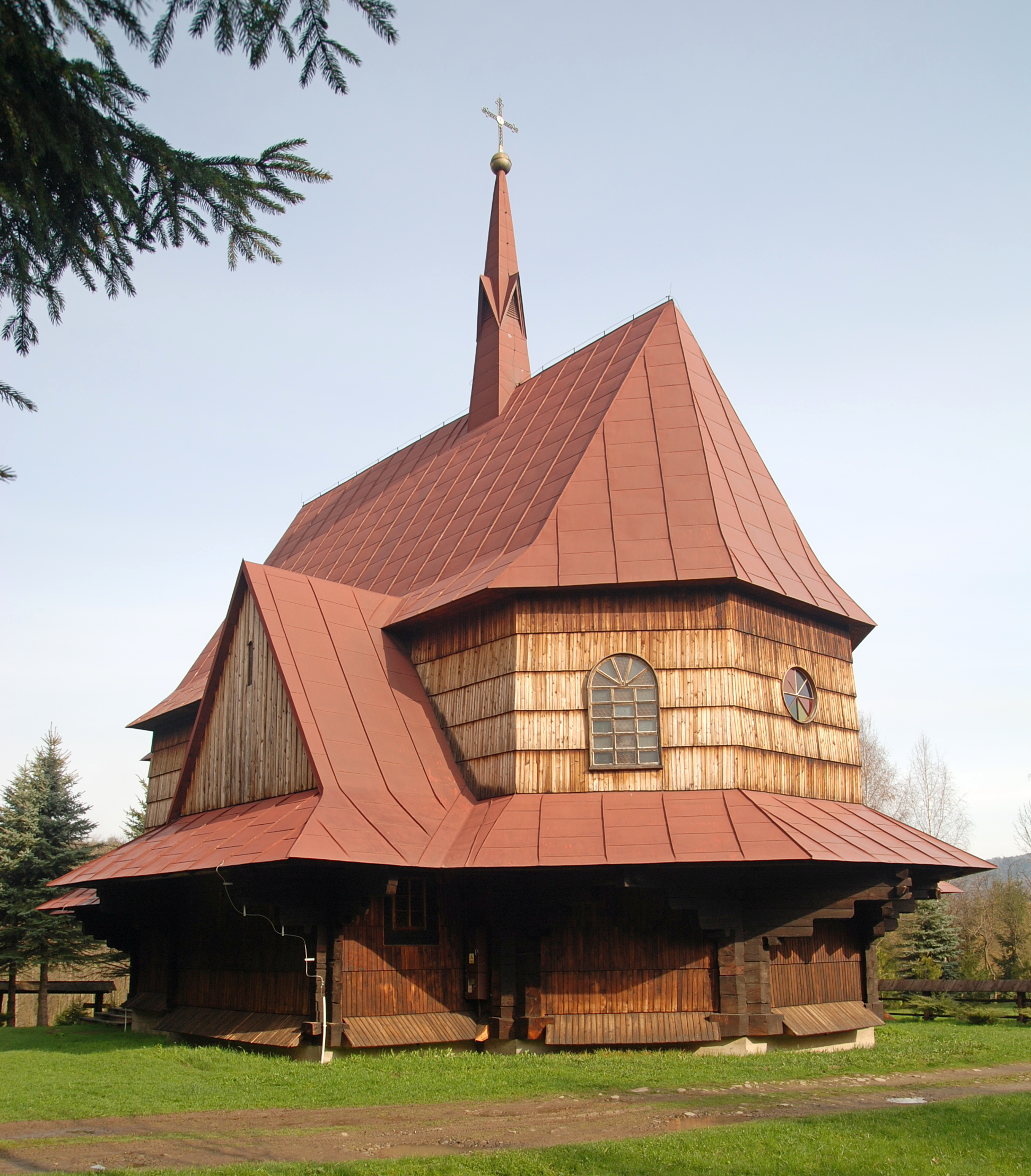 Dwernik - dawna cerkiew greckokatolicka pw. św. Michała Archanioła, obecnie kościół rzymskokatolicki p.w. św. Michała Archanioła, 1898, 1979-1980